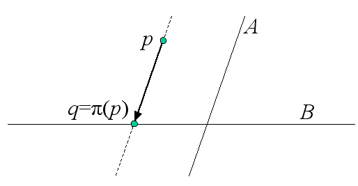 Grafische voorstelling van de projectie van een punt p op een rechte B, evenwijdig met een rechte A. Gecreëerd door Lieven Smits ten behoeve van het wikipedia-artikel "Projectie (wiskunde)".